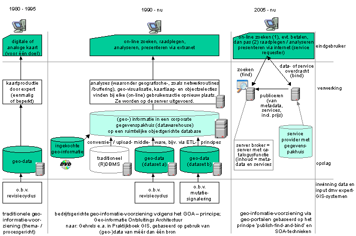 Zelf gemaakte media. onderwerp: Geo-informatie-voorziening